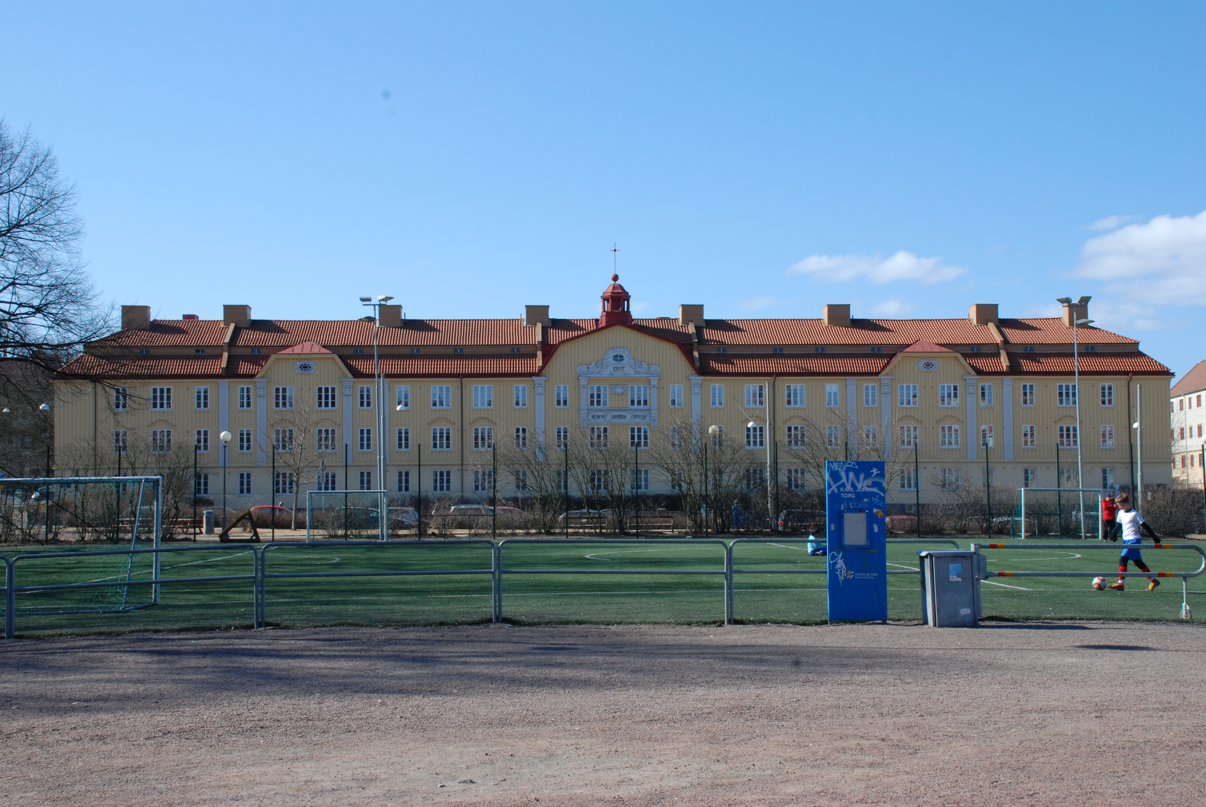 Såggatan 29-23, Kvarteret 16 Vagnborgen, tillhörande Dicksonska stiftelsen sett från Karl Johanstorget i Göteborg.